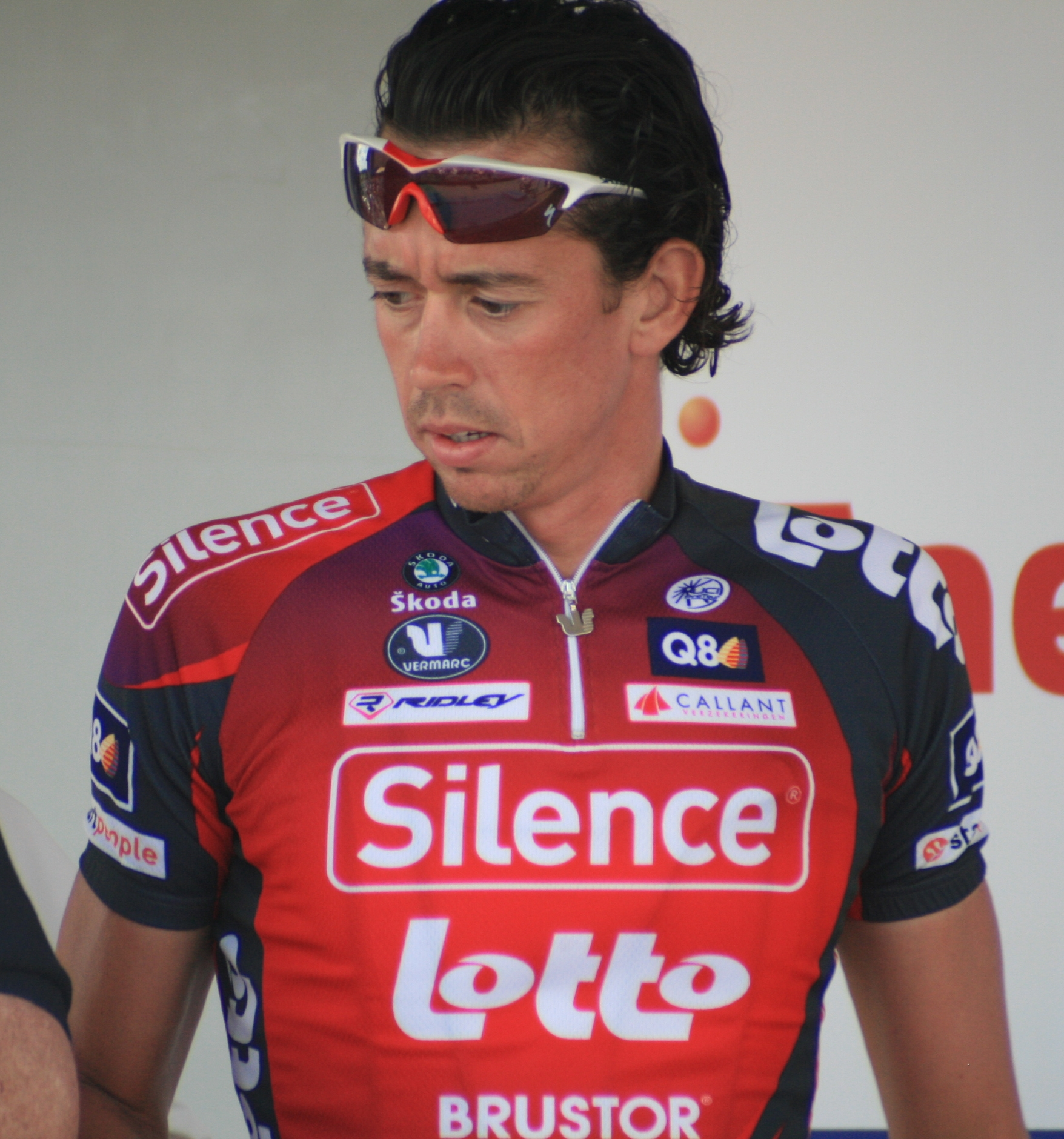 Leif Hoste, à l'Eneco Tour 2008